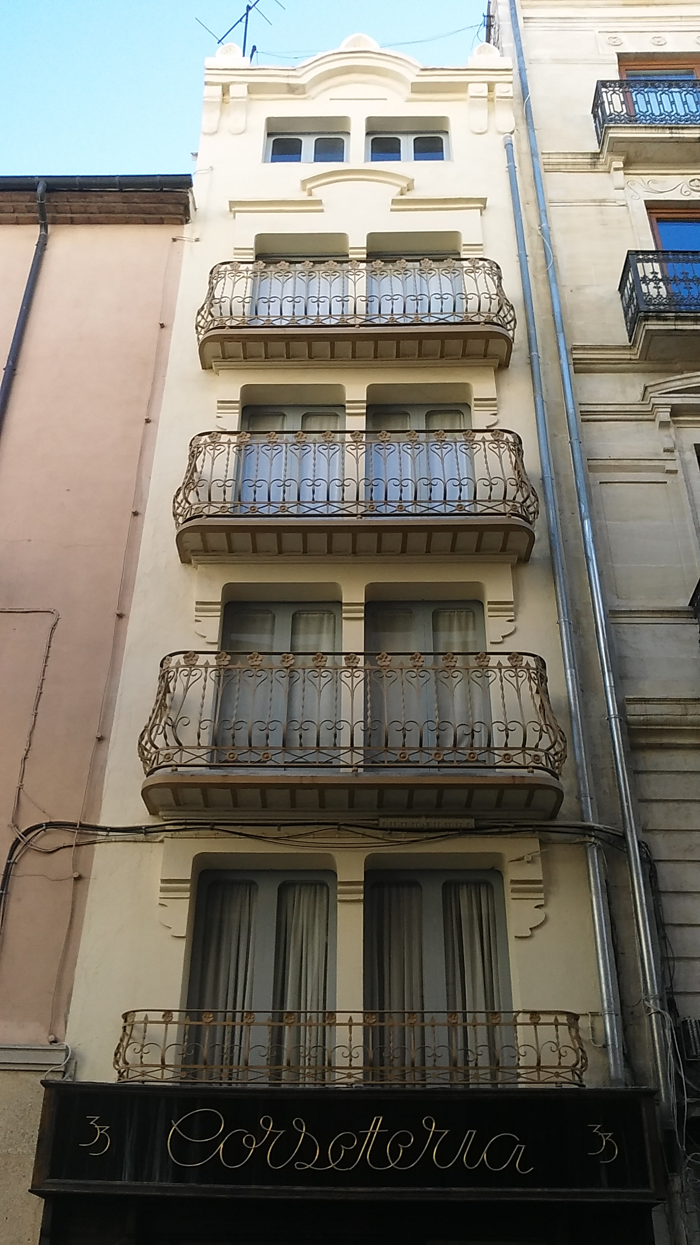 Edifici moderniste en carrer Sant Llorenç 27, en Alcoy (Alacant). Obra de l'arquitecte Vicent Pascual Pastor.